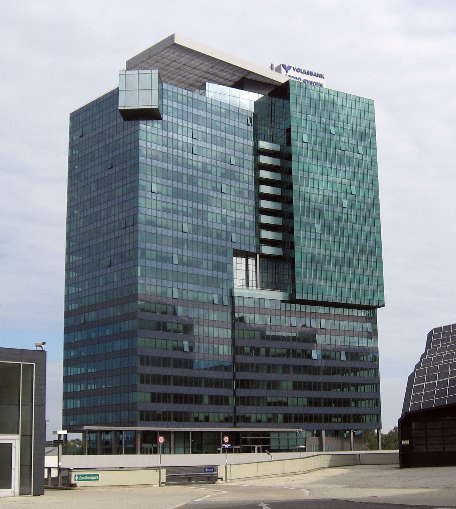 Wien, Donau City, Saturn Tower